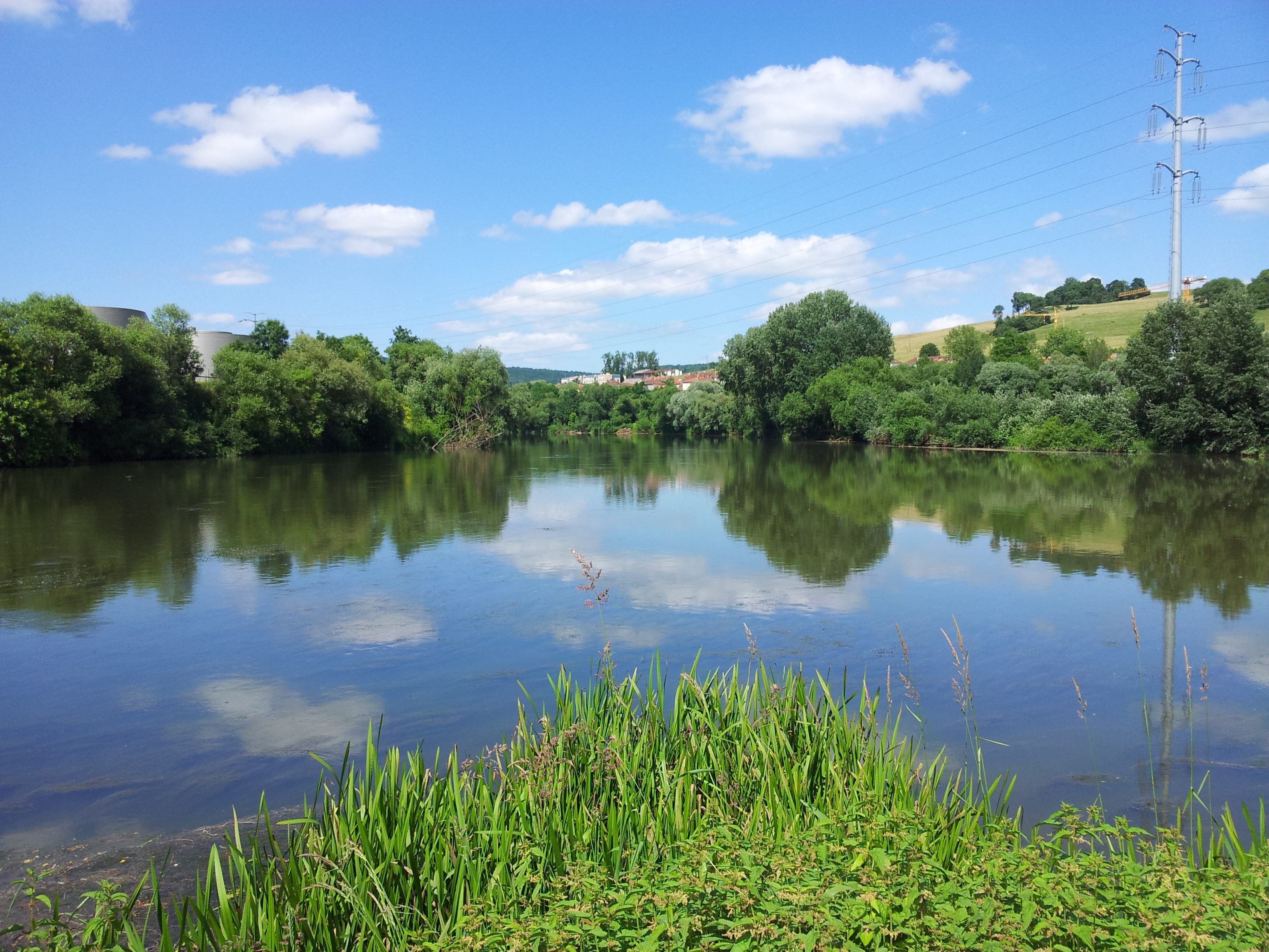 La Gueule d'enfer, confluent de la Moselle (à gauche) et de la Meurthe (à droite) vu vers l'aval. En face, on distingue les premières maisons de la commune de Custines.